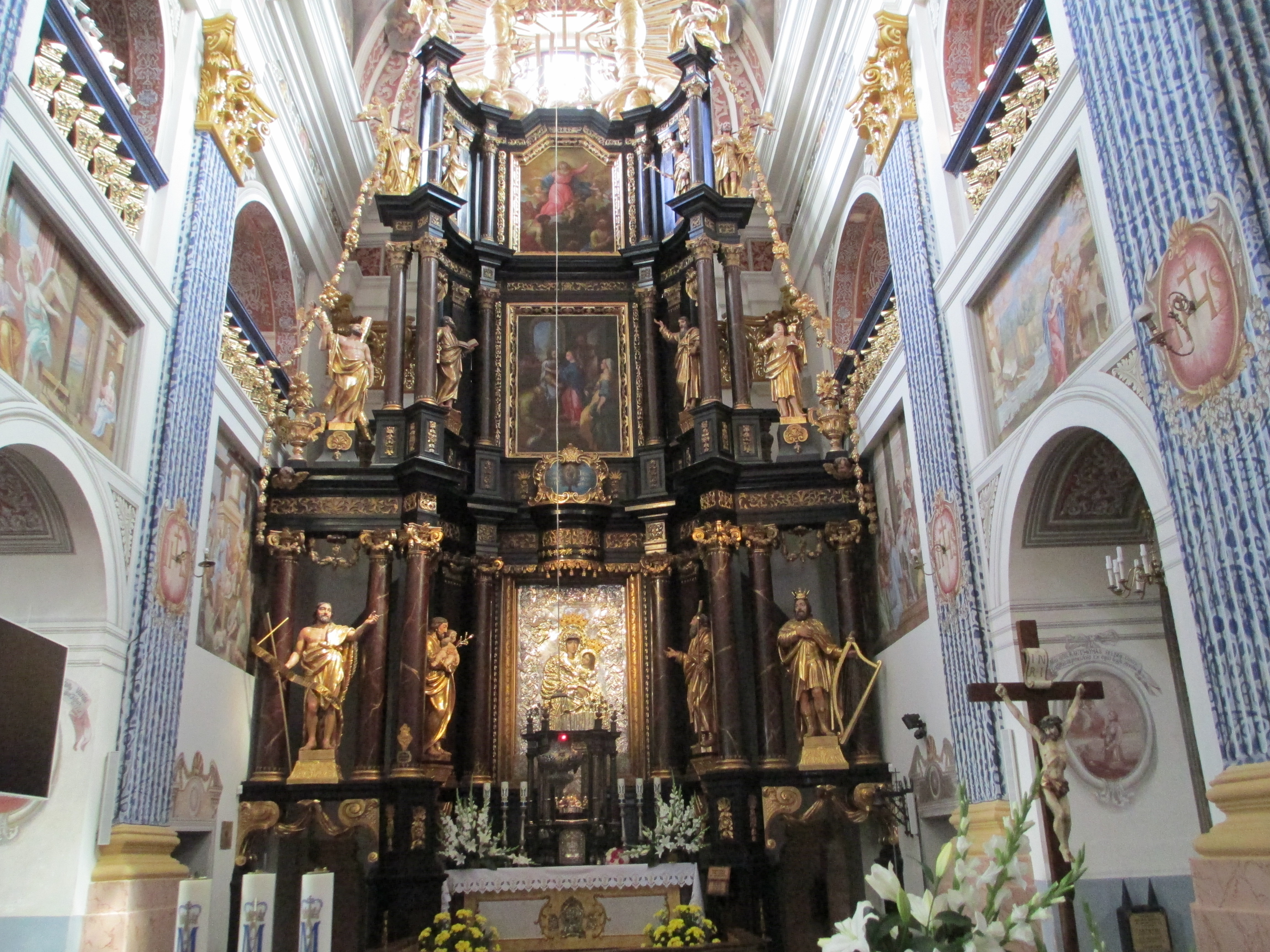 המזבח בכנסיית סבייטה ליפקה בפולין